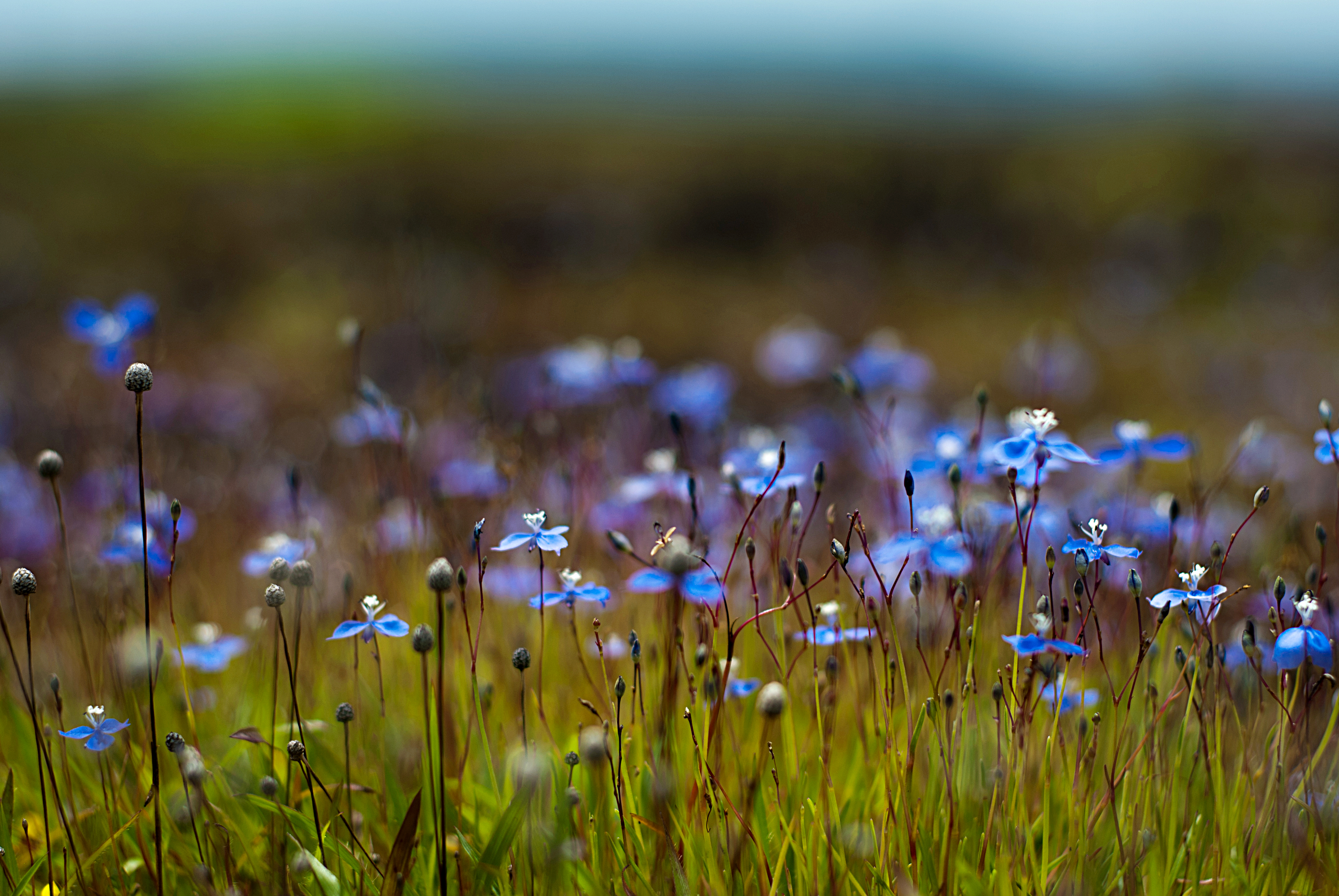 Annual Plant from Madayippara, Kerala, India.